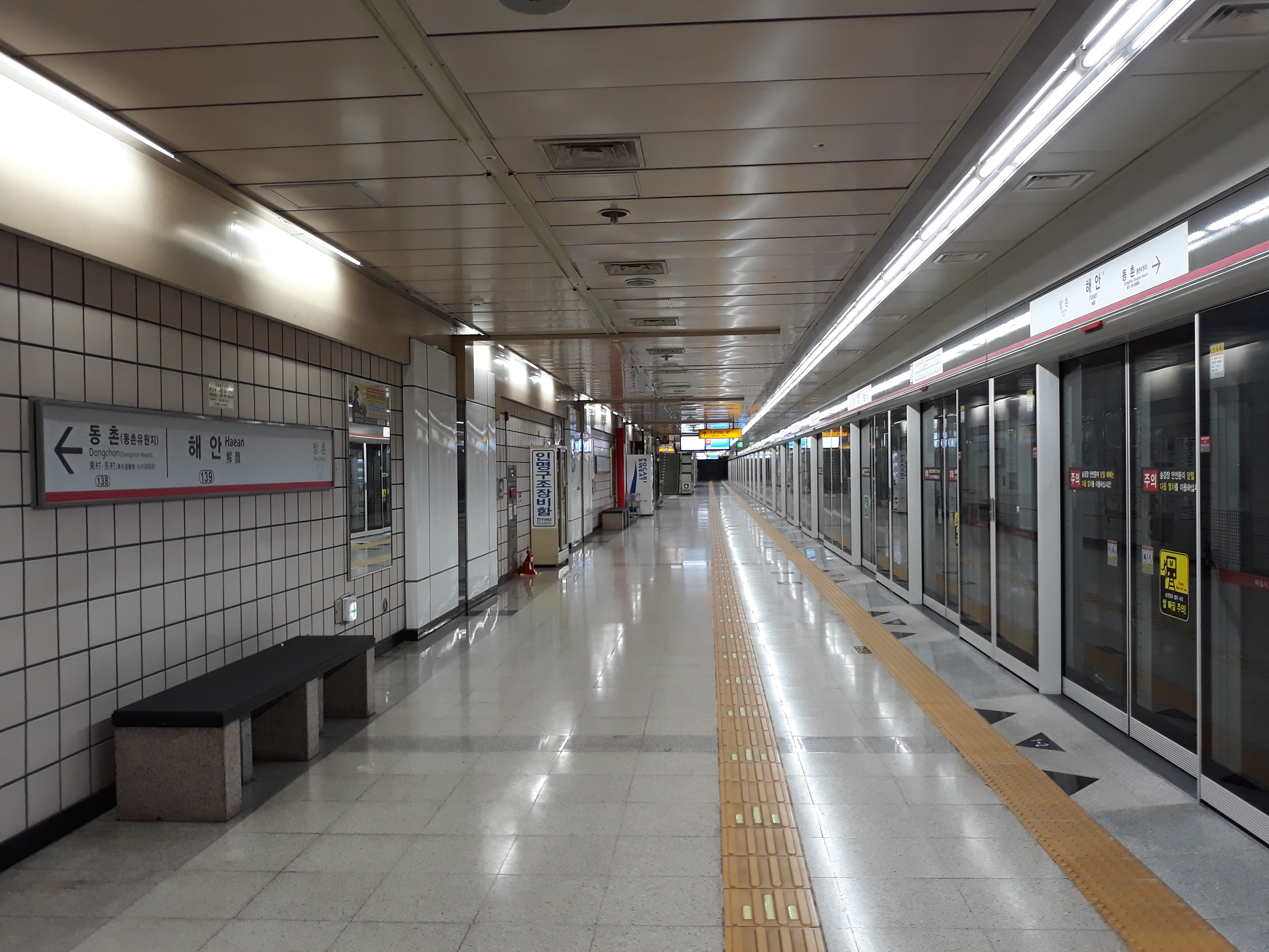 대구 도시철도 1호선 해안역 설화명곡 방면 승강장